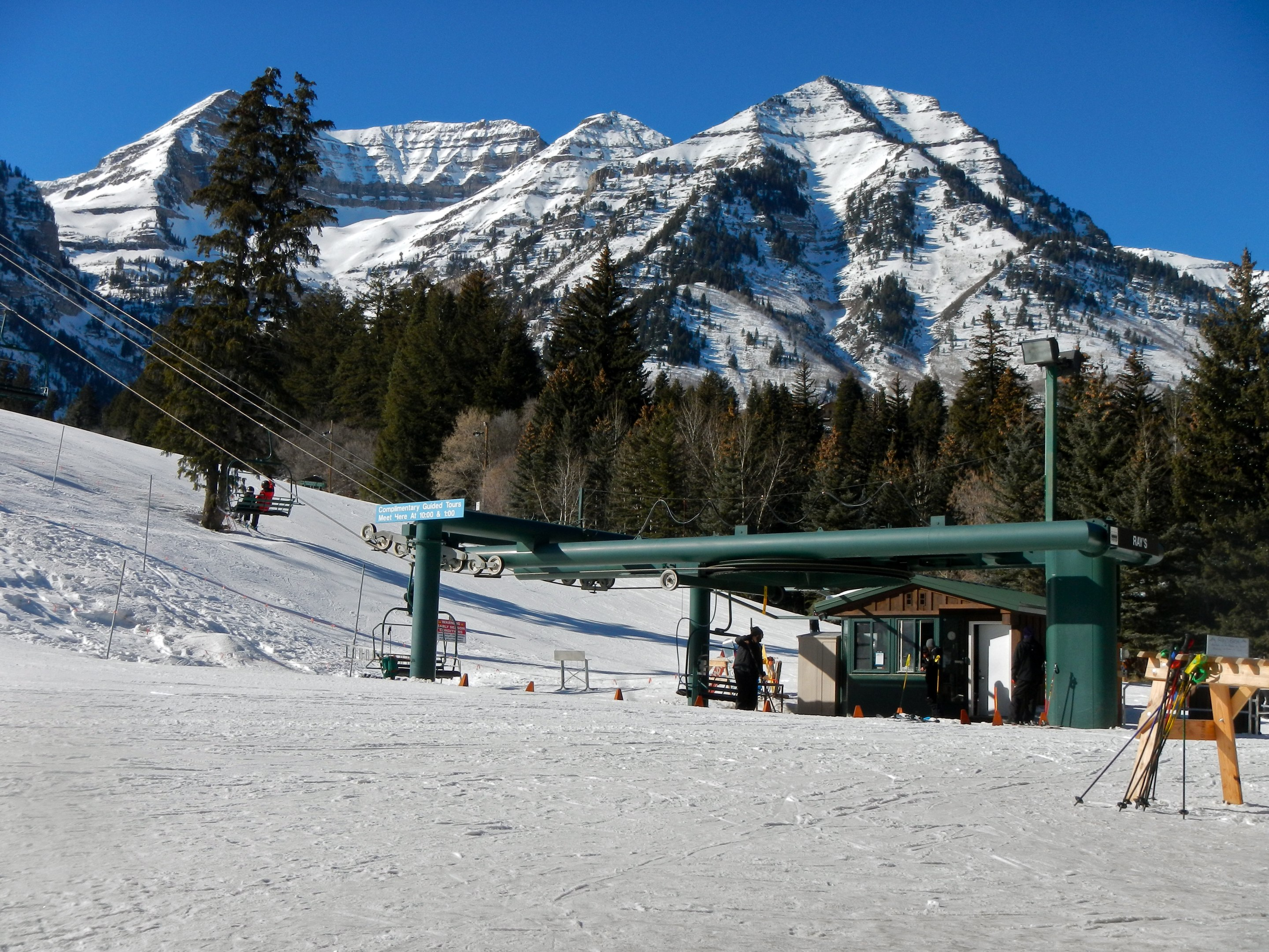 Sundance Resort